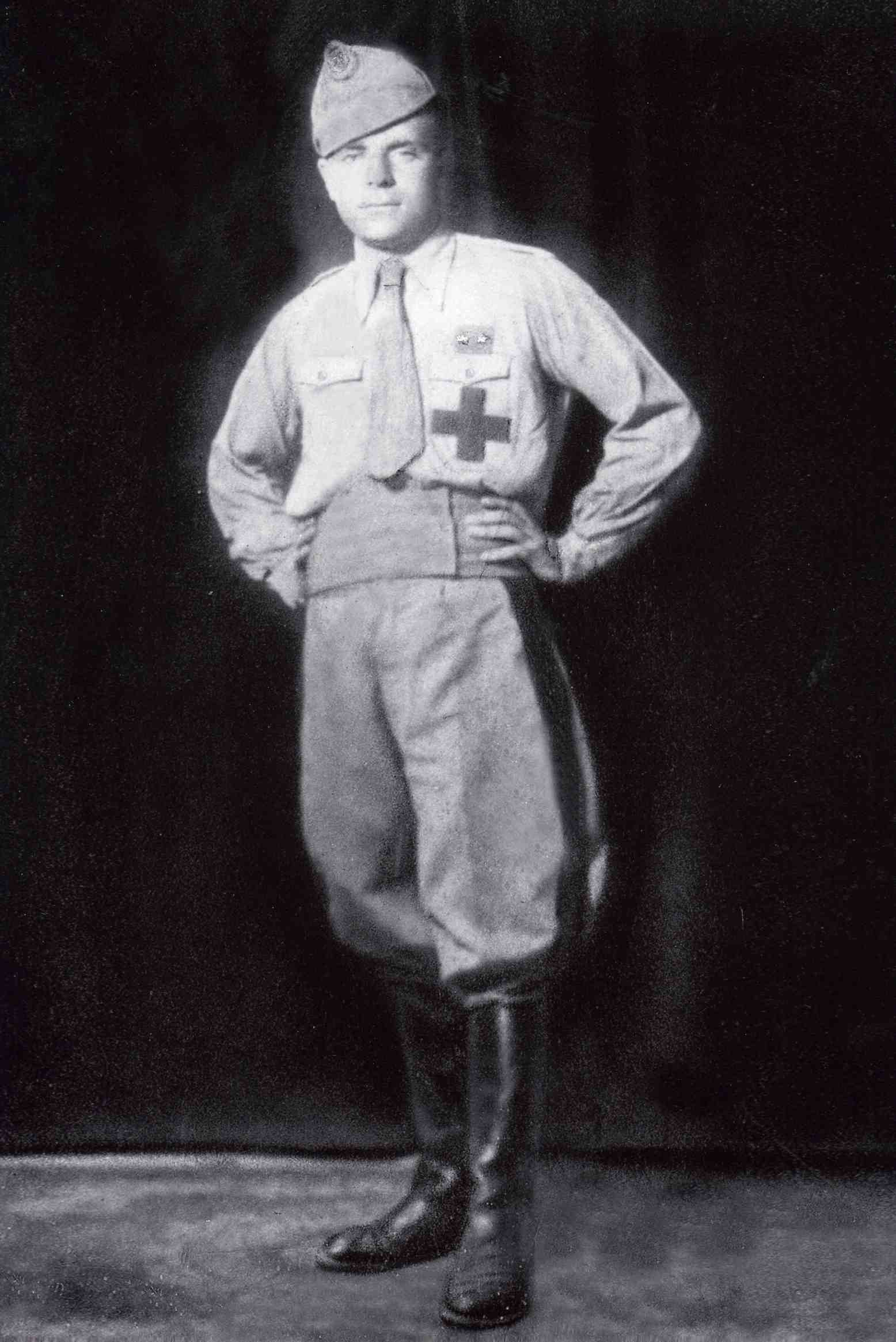 il mio prozio cappellano militare e medaglia d'argento al valore